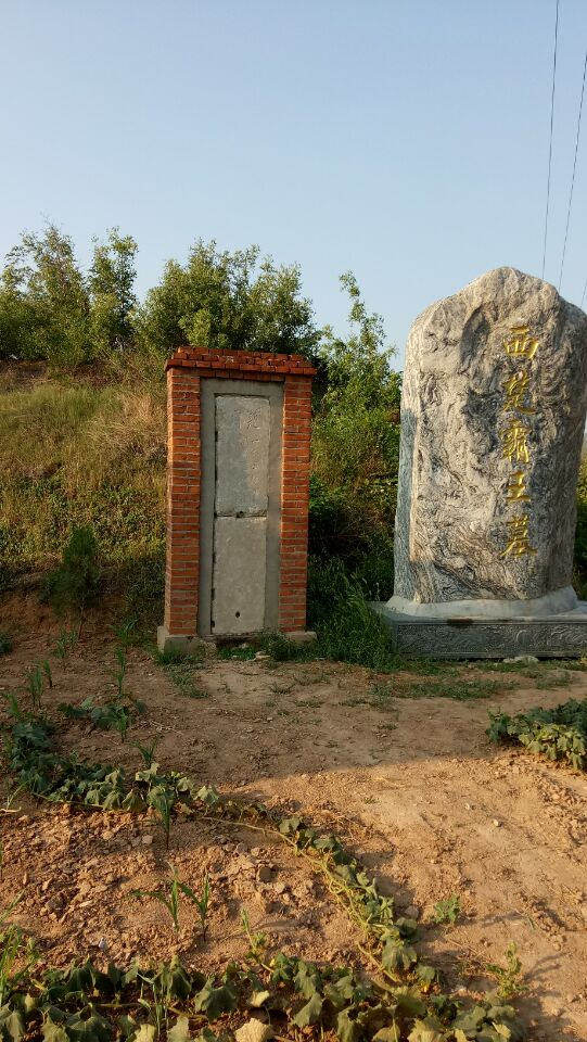 位于旧县境内的西楚霸王墓